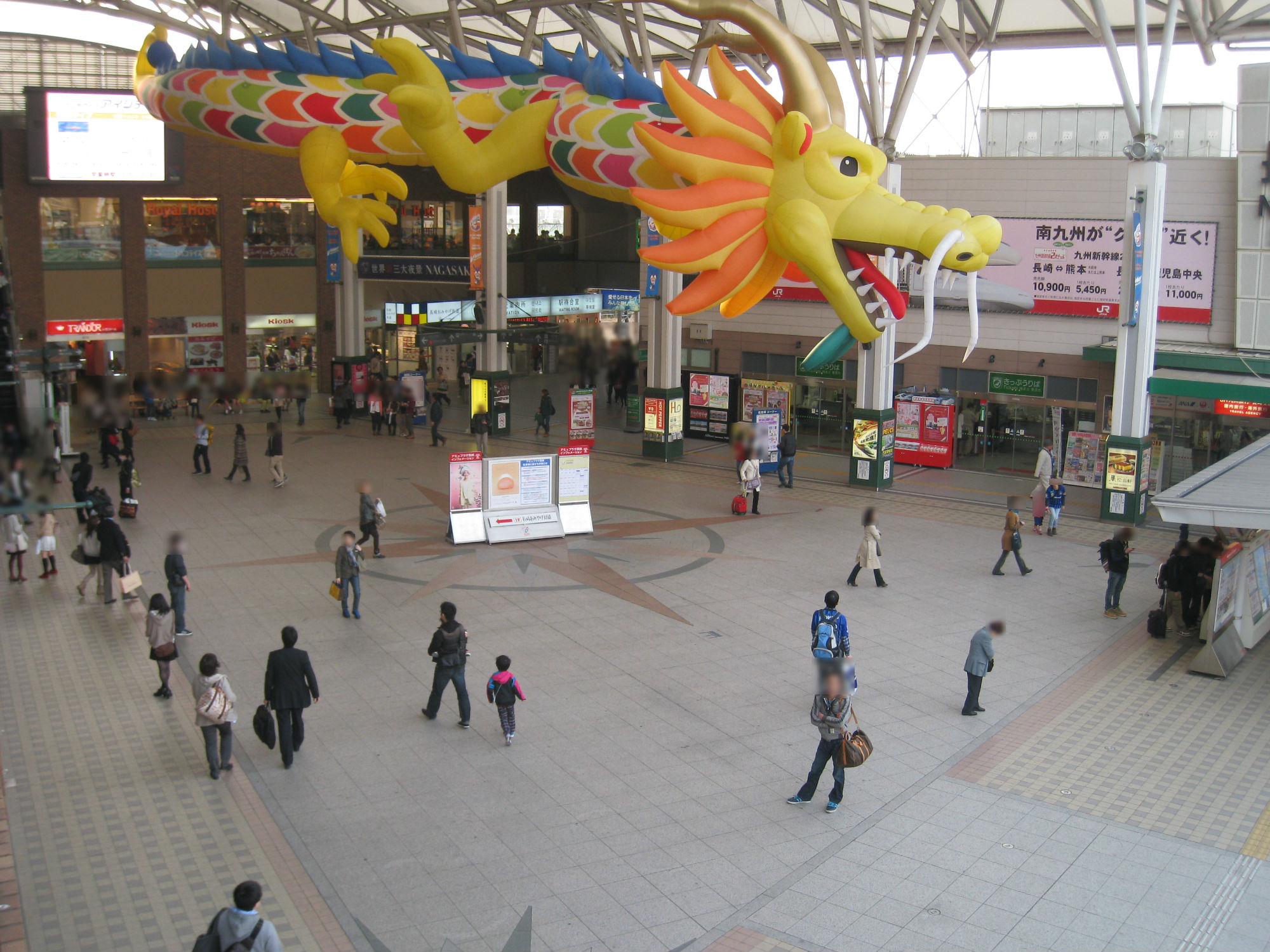 長崎駅かもめ広場